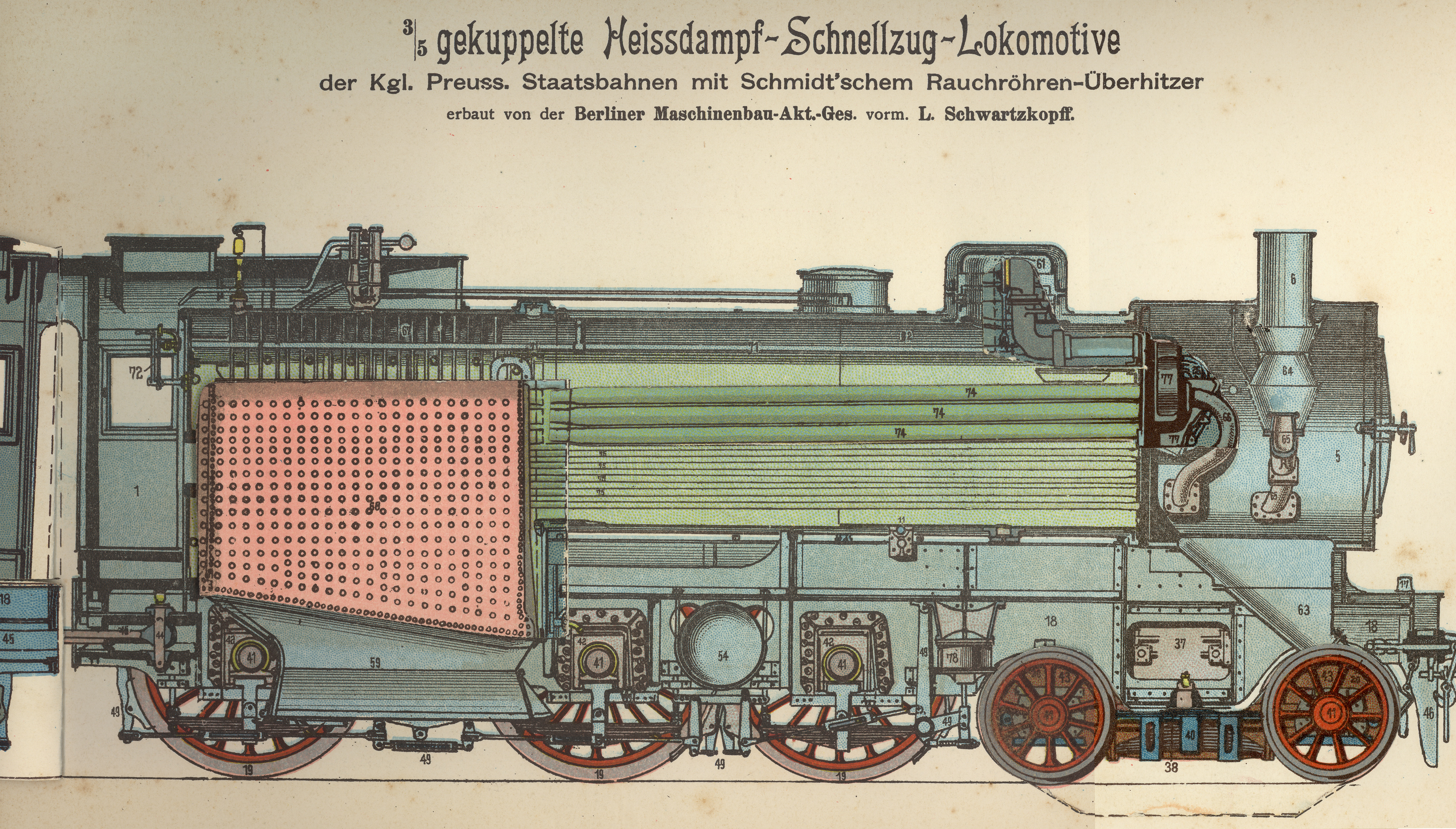 Lokomotive kgl. preußische Staatsbahnen Berliner Maschinenbau AG, Innenansicht Die Schöpfungshöhe dieser colorierten technischen Zeichnung ist grenzwertig, der Urheber kann mit vertretbarem Aufwand nicht ermittelt werden (ist in dem genannten Atlas nicht vermerkt). Somit ein Fehler des Herausgebers 1908, er hätte den Urheber nennen müssen.